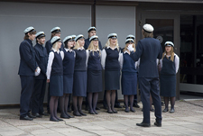 DQ och OP